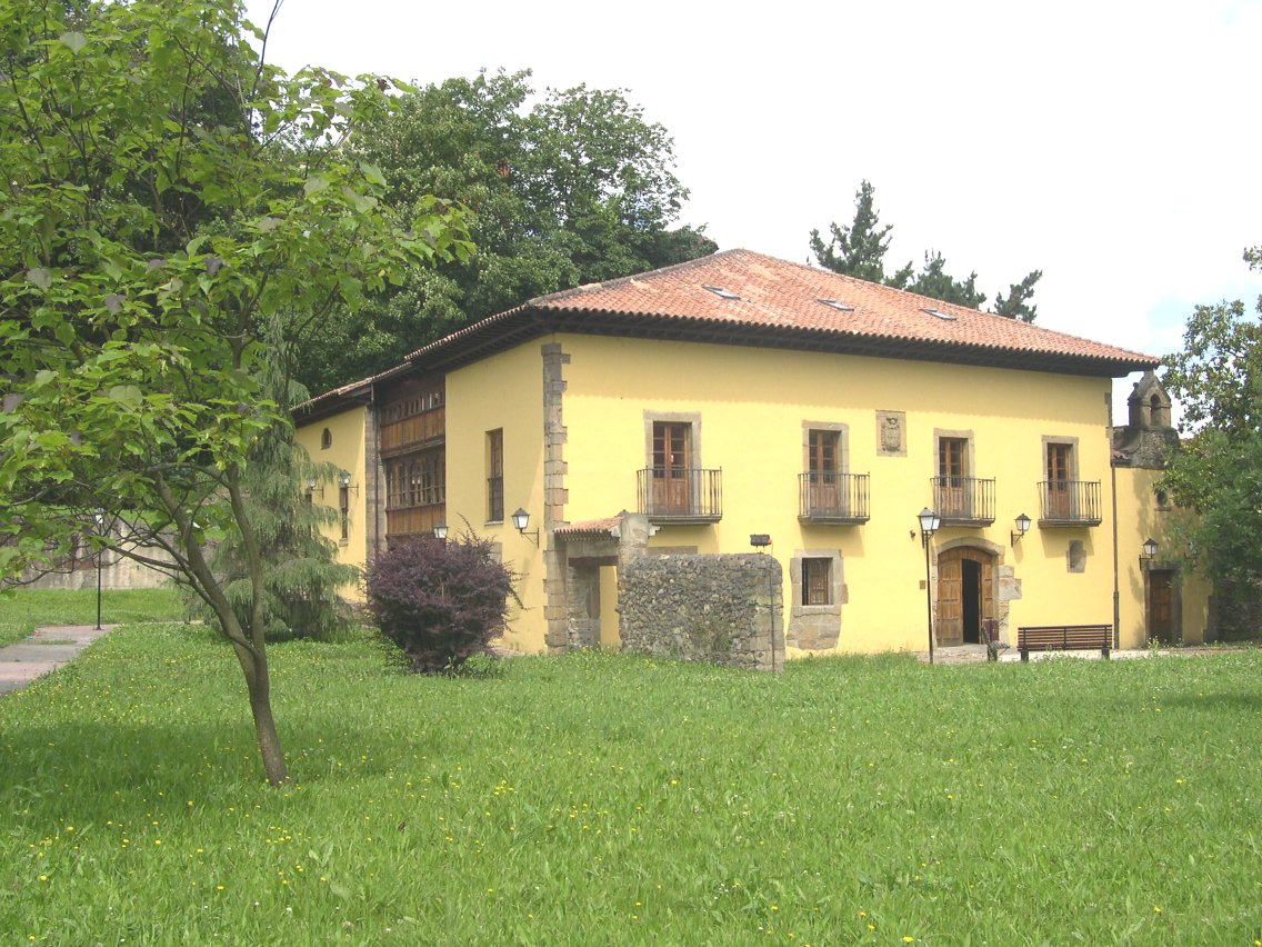 Casa la Buelga en Ciañu, Llangreu. Asturies